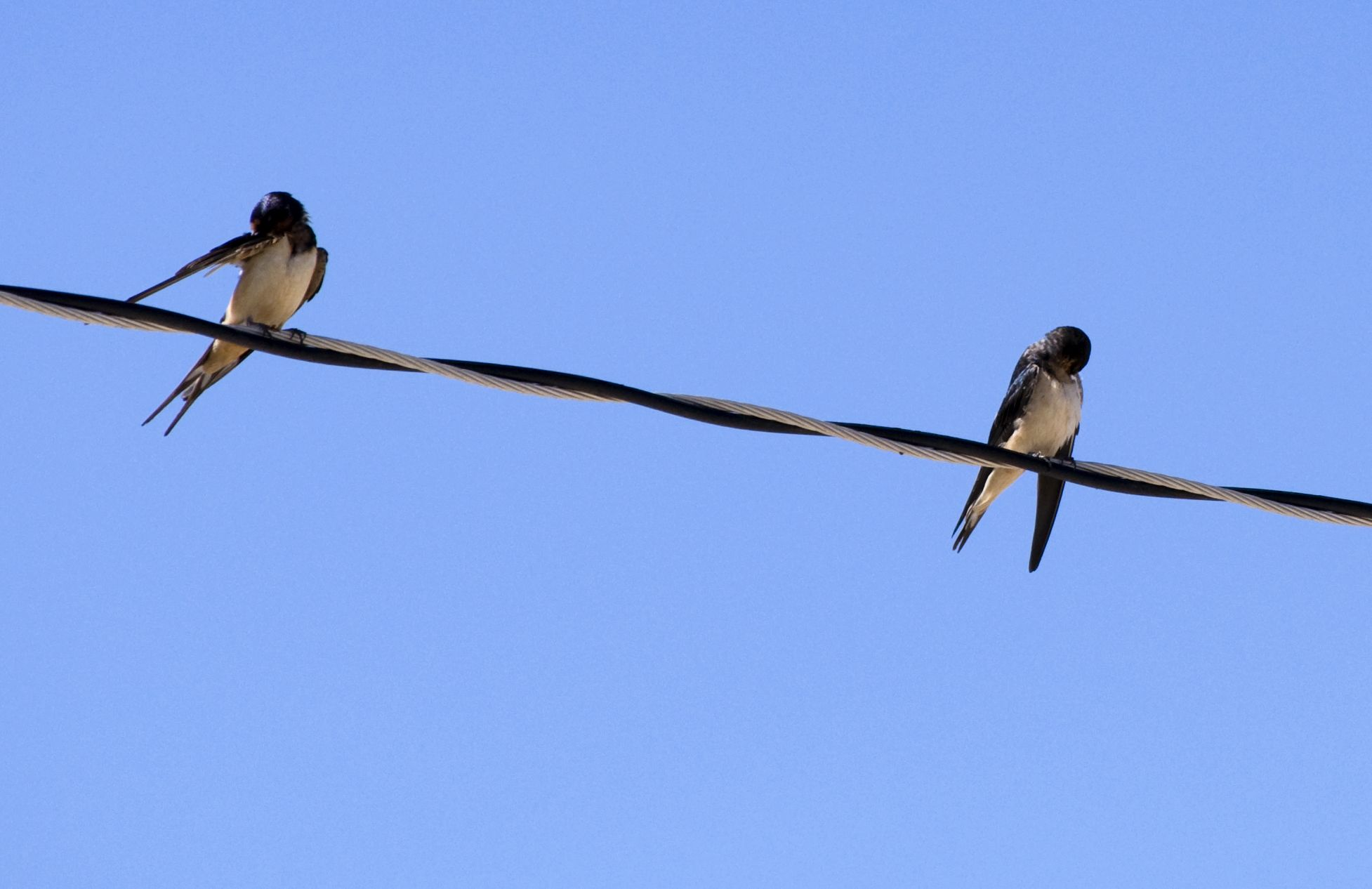 Barn Swallows Hirundo rustica erythrogaster, Arizona.